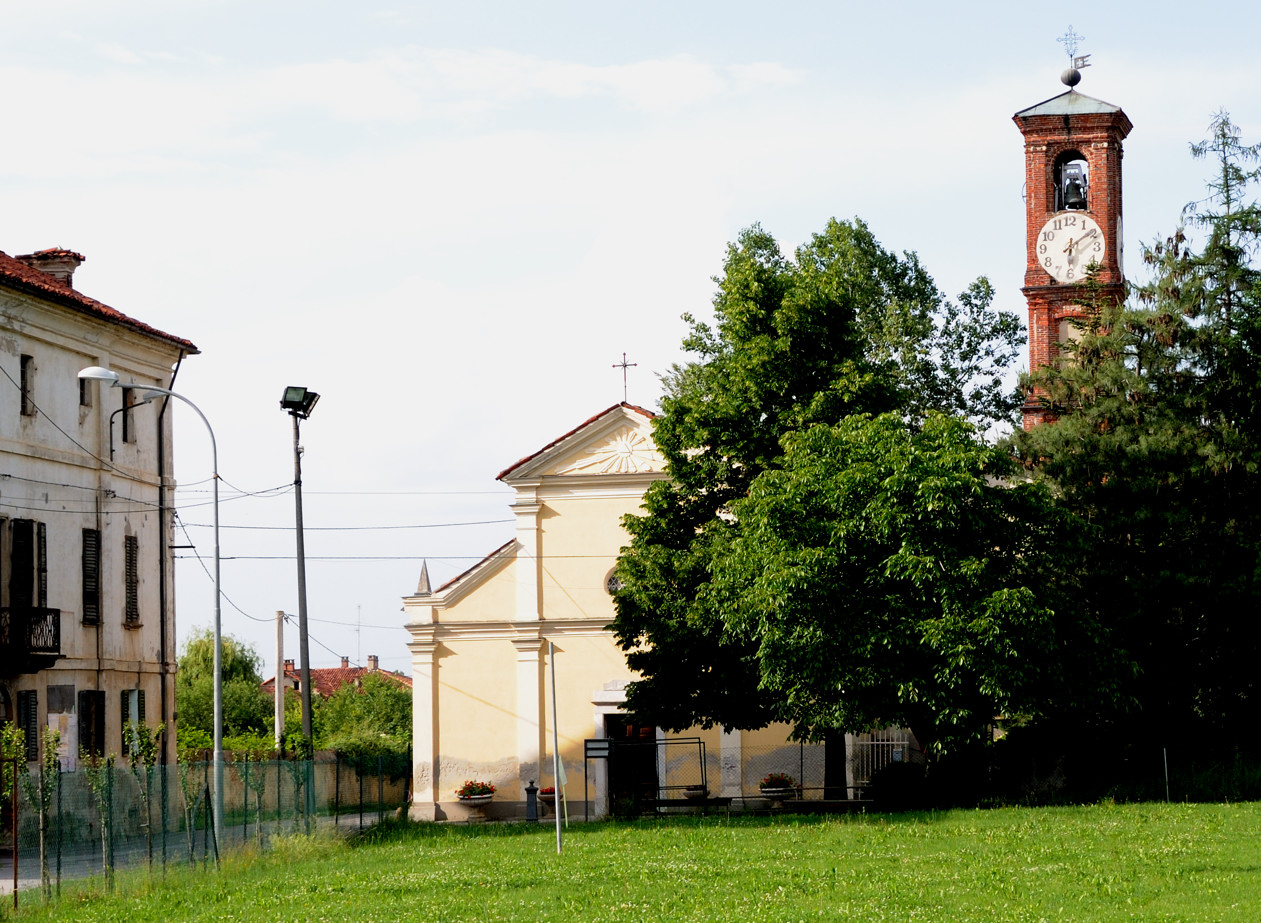 Riccardo Burdisso